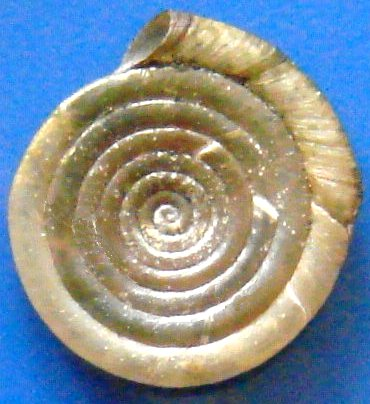 Anisus septemgyrus